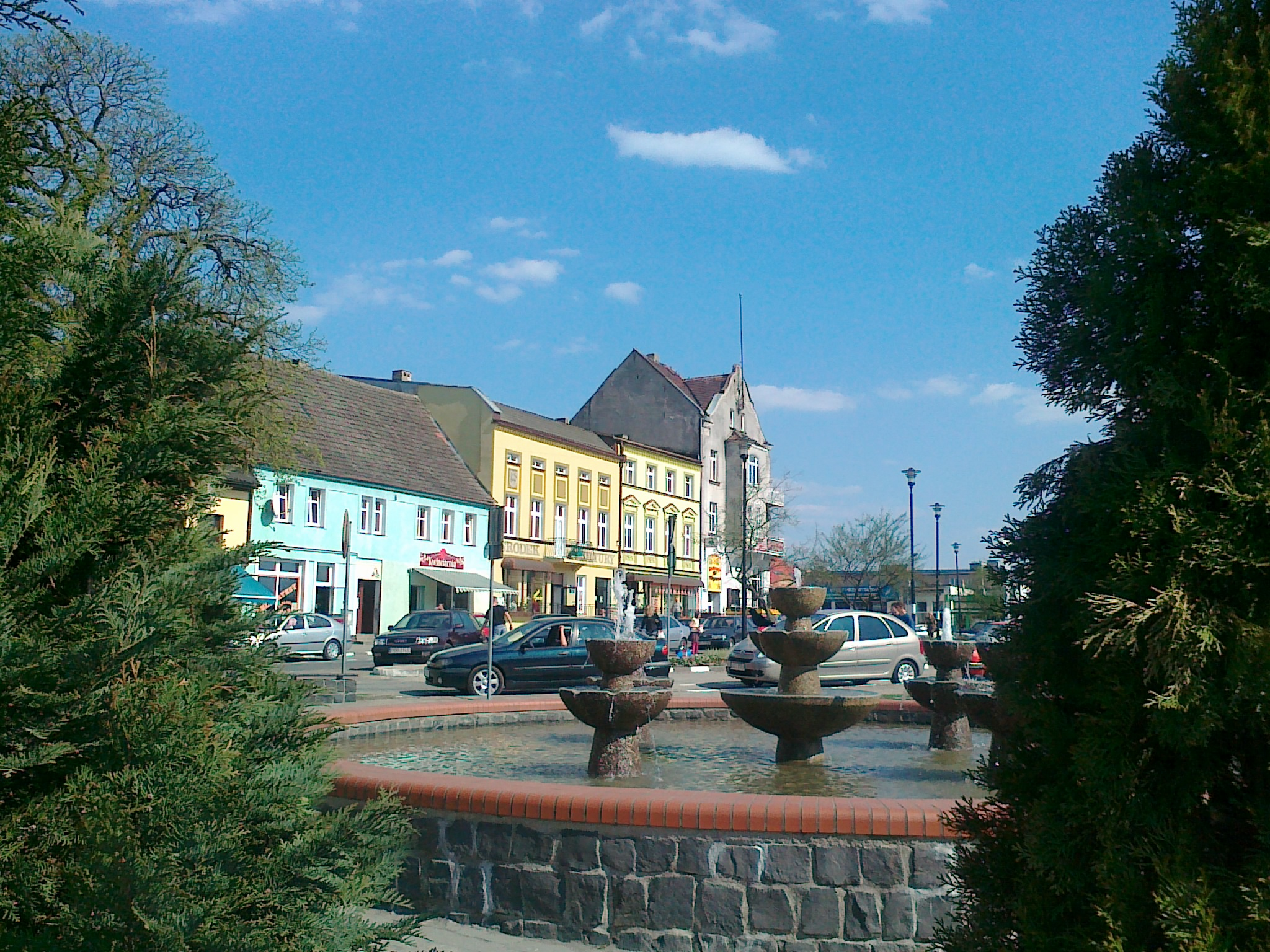 W Bobolicach przy fontannie